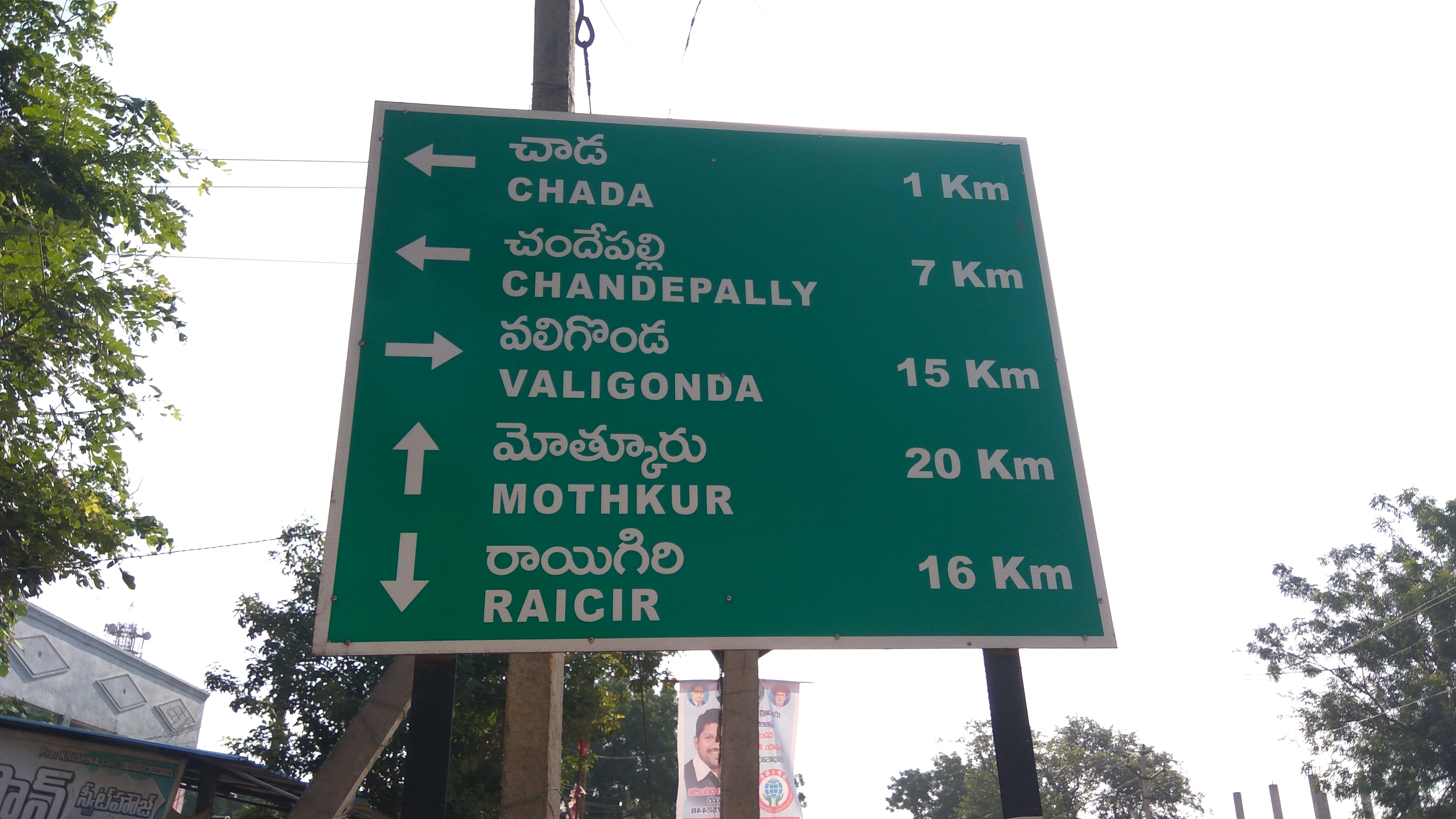 ముత్తిరెడ్డి గూడెం పేరు